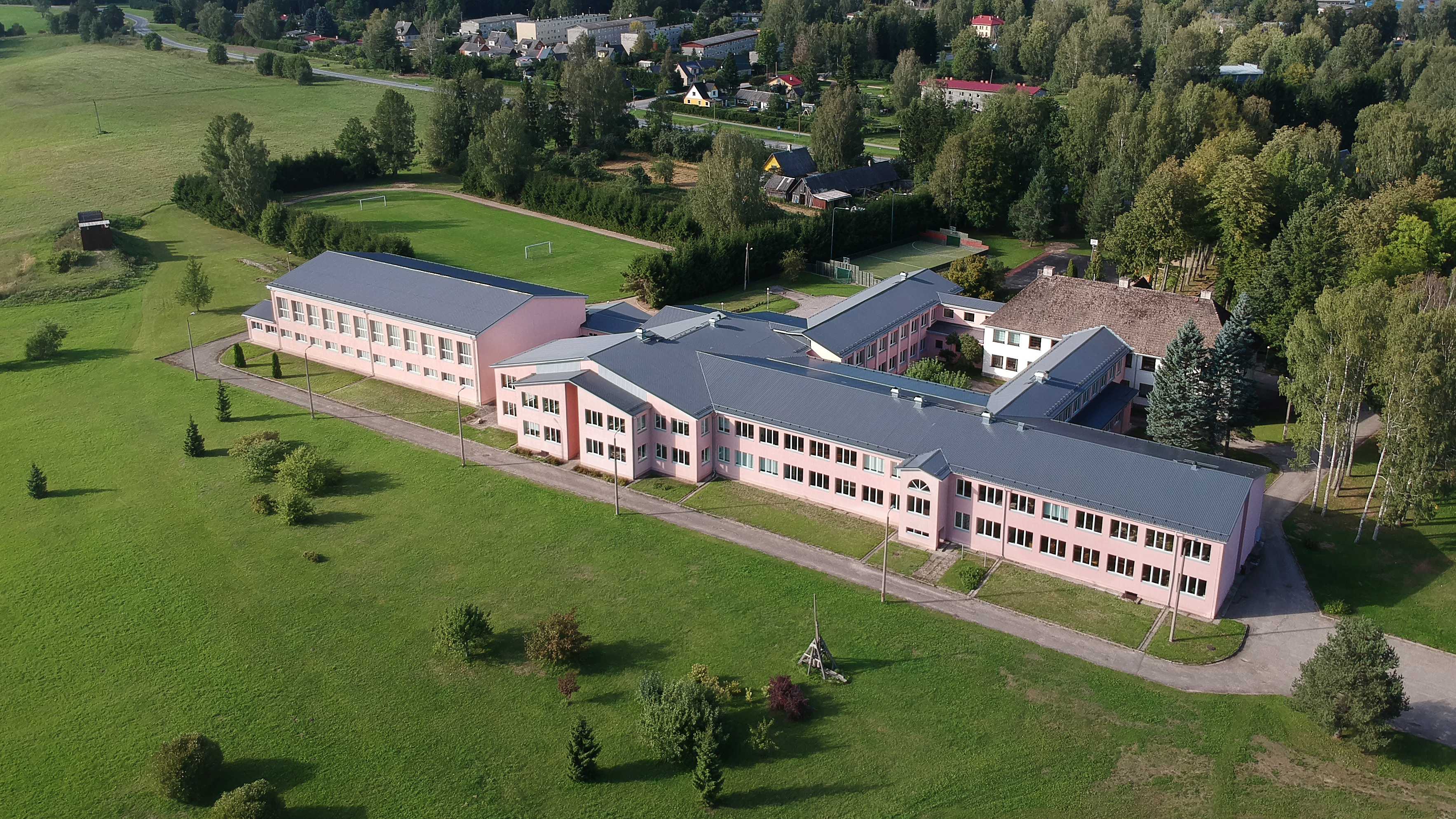 Parksepa Keskkool 2018. aastal.